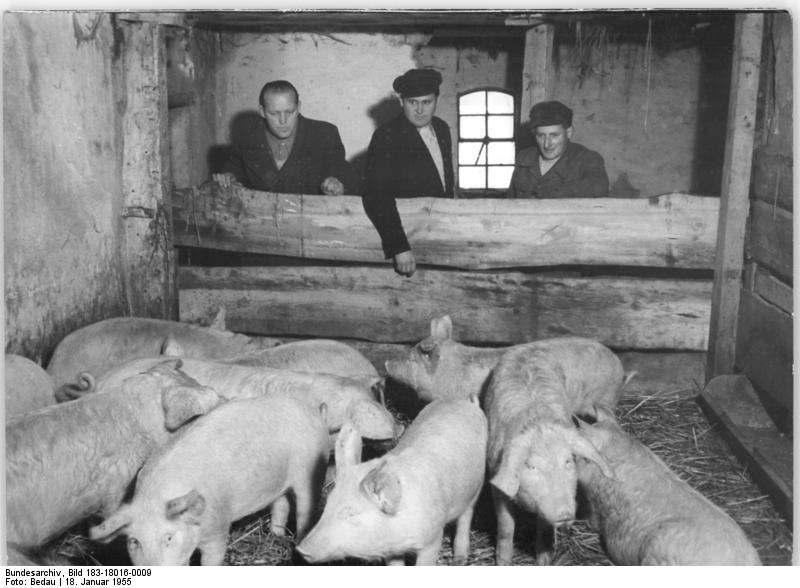 Zentralbild-Bedau Me-Bed. 18.1.1955 Vorbildliche Ablieferung in der Landwirtschaftlichen Produktionsgenossenschaft Bunsrade-Kr. Schwerin. Bereits Mitte Januar 1955 haben die Mitglieder der Landwirtschaftlichen Produktionsgenossenschaft Consade 10% ihres Jahresablieferungssolle an Eiern erfüllt. In einem Schweinehauptanteil ziehen die Genossenschaftler zusätzlich 60 Mastschweine auf, die sie als freie Spitzen abliefern werden. UBz, Die Pflege und Zucht der 60 Schweine im großen Gemeinschaftsstall übernahm der Schweinemeister (rechts), der auch bei der geplanten gesamten gemeinschaftlichen Viehzuchthaltung (Statut der LPG Typ 3) als Viehzuchtbrigadier tätig sein wird. (Mitte) Der Vorsitzende der Genossenschaft Franz Schmale (links) Bürgermeister Hoffman.